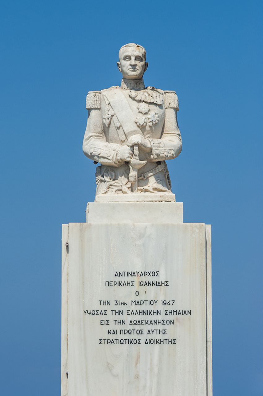 Προτομή του Αντινάβαρχου Περικλή Ιωαννίδη.